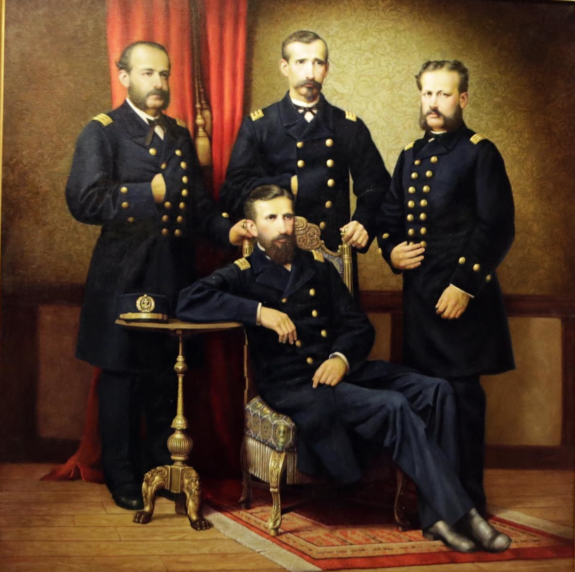 El titular del sector, acompañado del Comandante General de la Marina, Almirante Carlos Tejada, develó el busto de Miguel Grau en la Comandancia General de la Marina, en la Perla, como parte de la velada "Homenaje a Grau a través del Arte". el busto de Miguel Grau fue realizado por el artista Alonso Núñez.